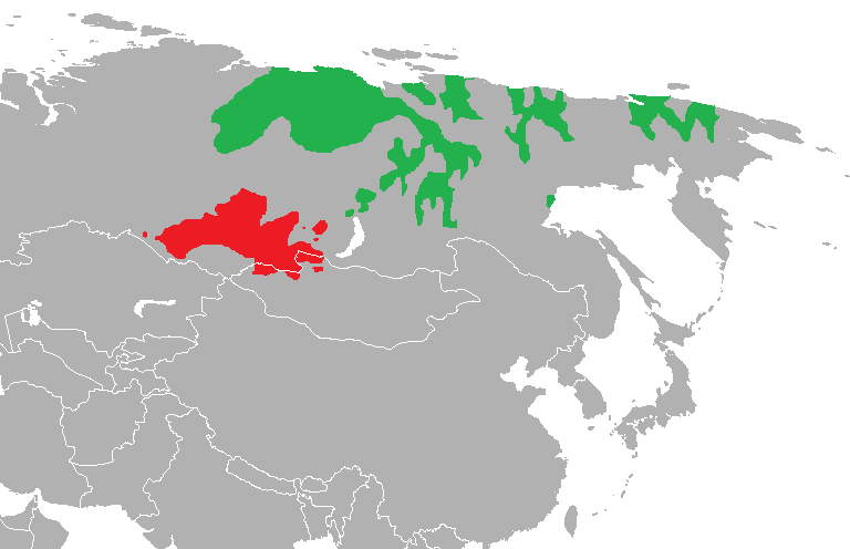 Lenguas túrquicas siberianas Septentrionales Meridionales